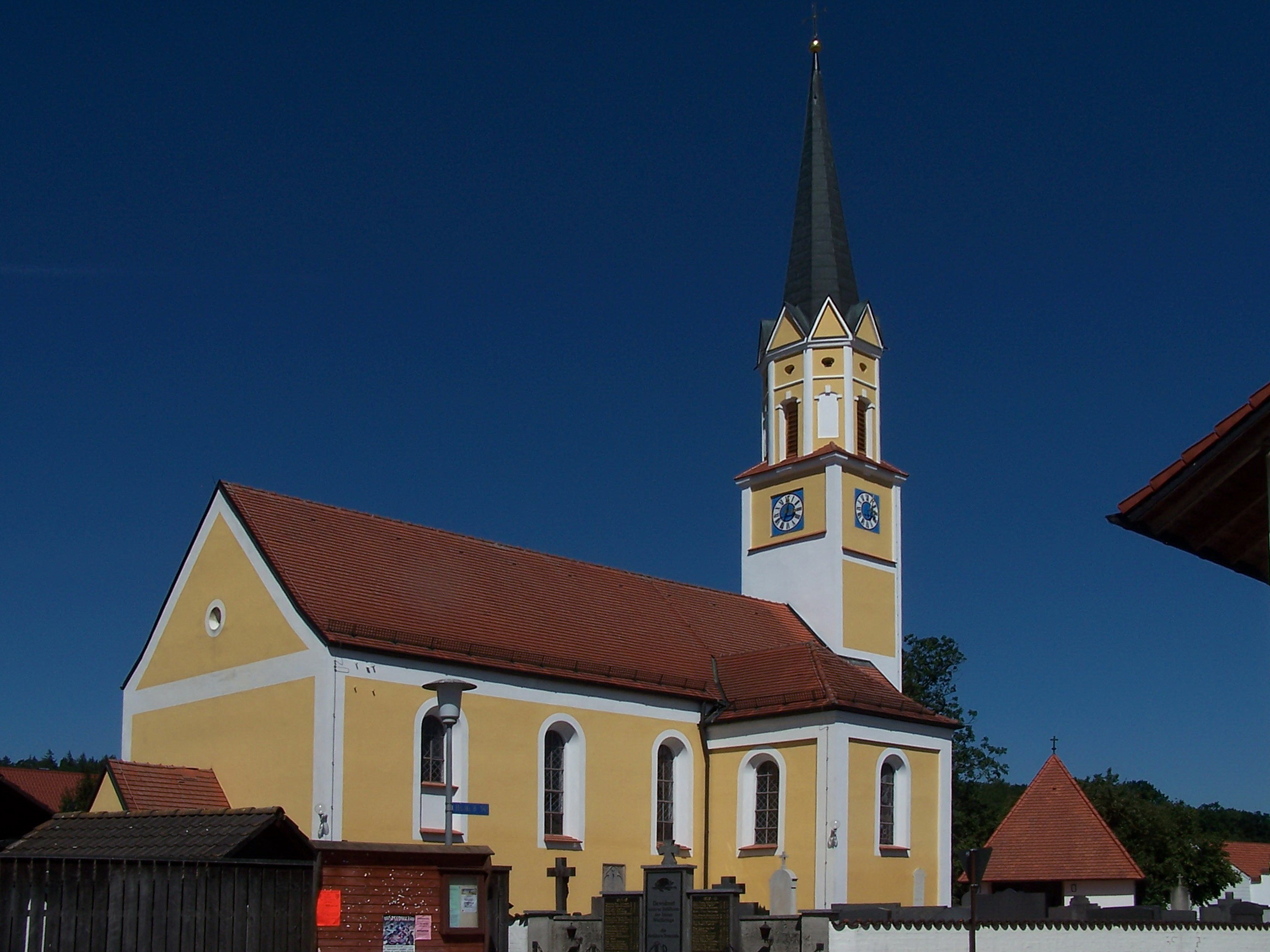 Schatzhofen bei Furth. Katholische Filialkirche St. Michael, Chor romanisch, 12. Jahrhundert, Langhaus 1687 von Victor Thoni; mit Ausstattung.